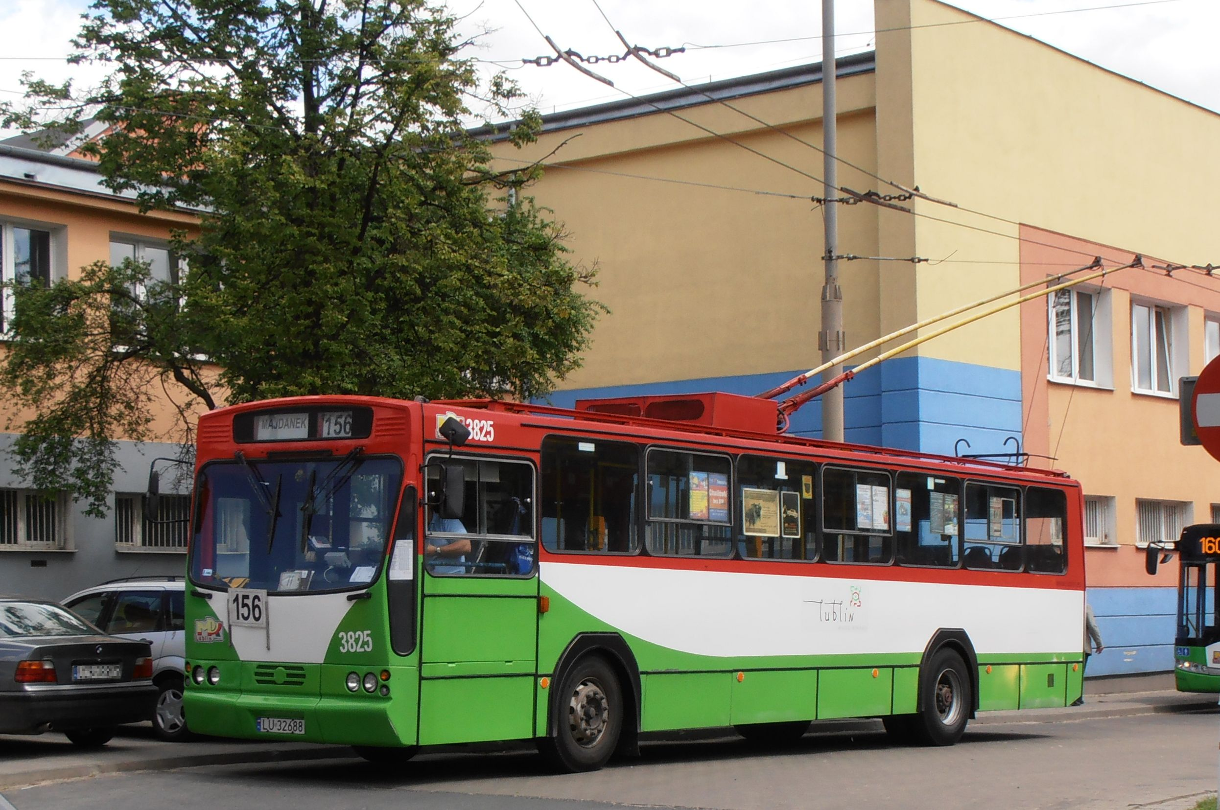 Lublin. Trolejbus Jelcz PR110E #3825 linii 156 na przystanku „Chodźki Szpital”.